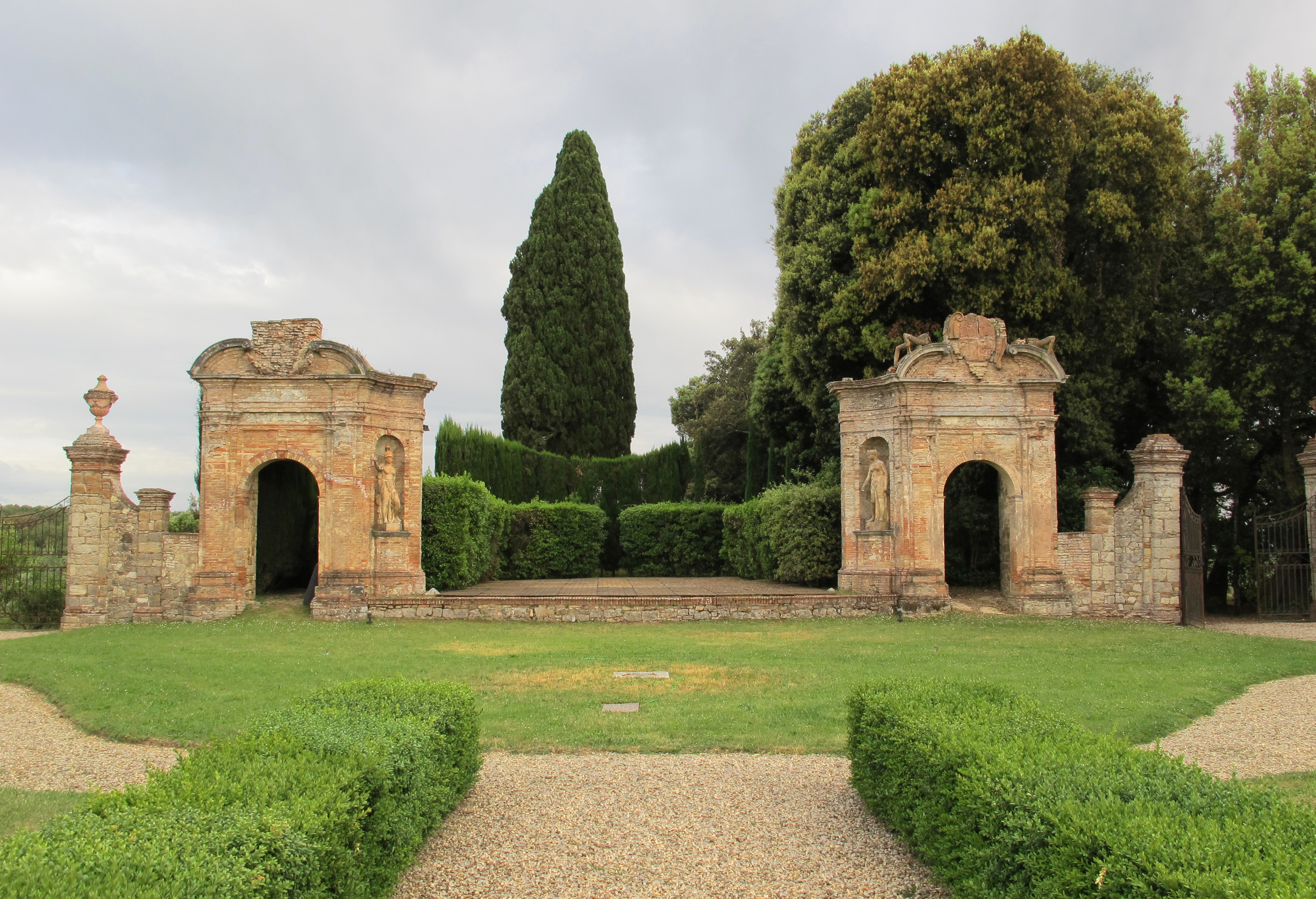 Villa di Geggiano